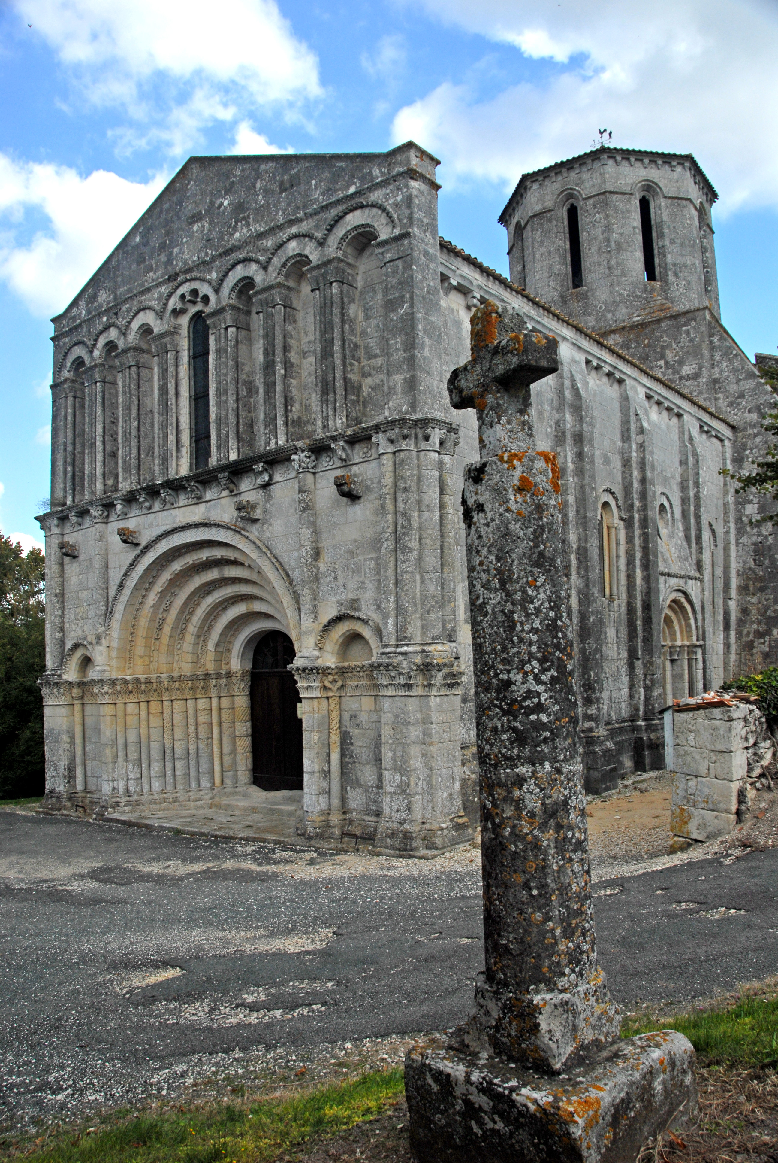 .Echebrune, St.-Pierre,Übersich von Südwest